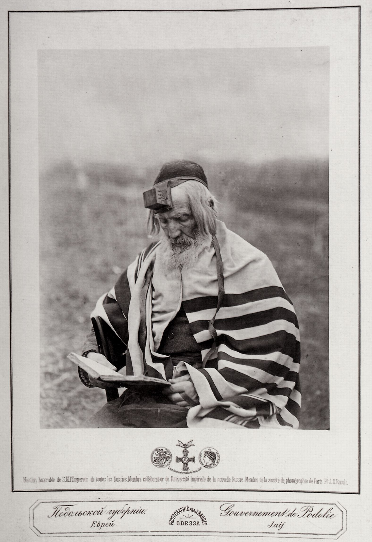 Jude im Gouvernement Podol'sk